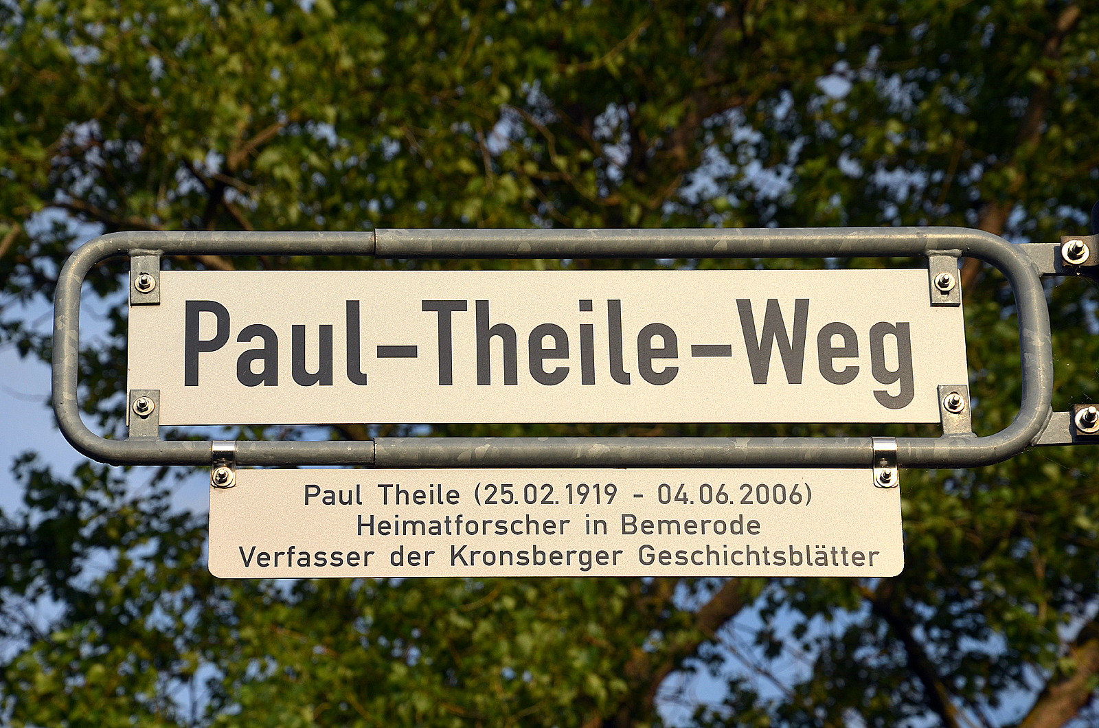 Das Straßenschild am Paul-Theile-Weg am Kronsberg mit der zusätzlich angebrachten Legendentafel: „Paul Theile (25.02.1919 - 04.06.2006) / Heimatforscher in Bemerode / Verfasser der Kronsberger Geschichtsblätter“ ...